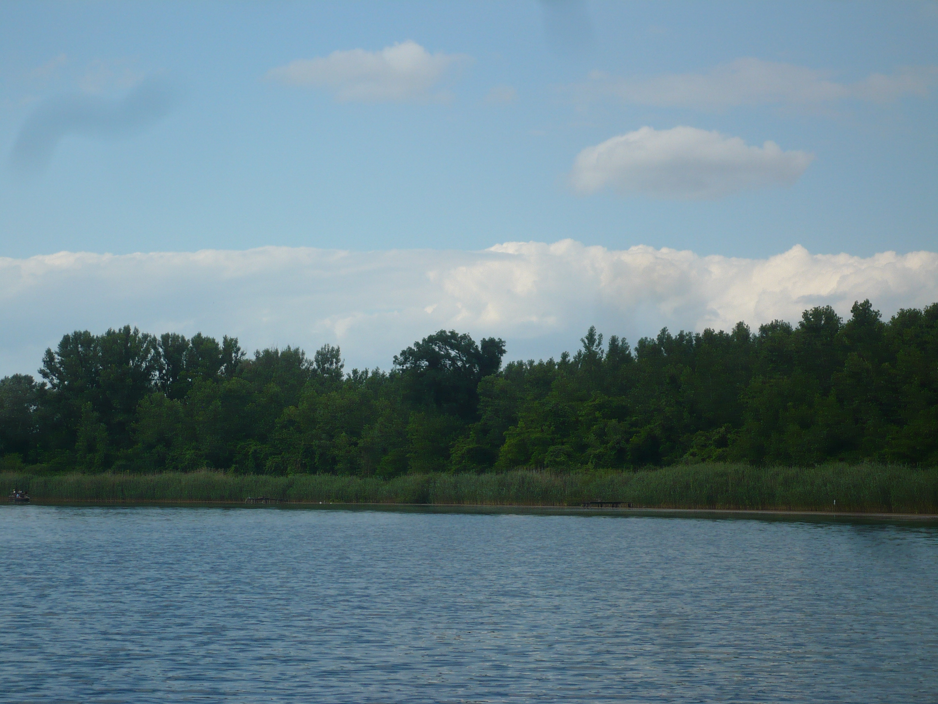 A Bajai-csatorna Bezdánnál (Szerbia)